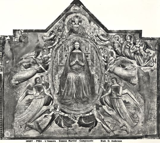 Pisa, assunzione della vergine che vasari dà a stefano fiorentino (distrutta nel 1944) 03.jpg